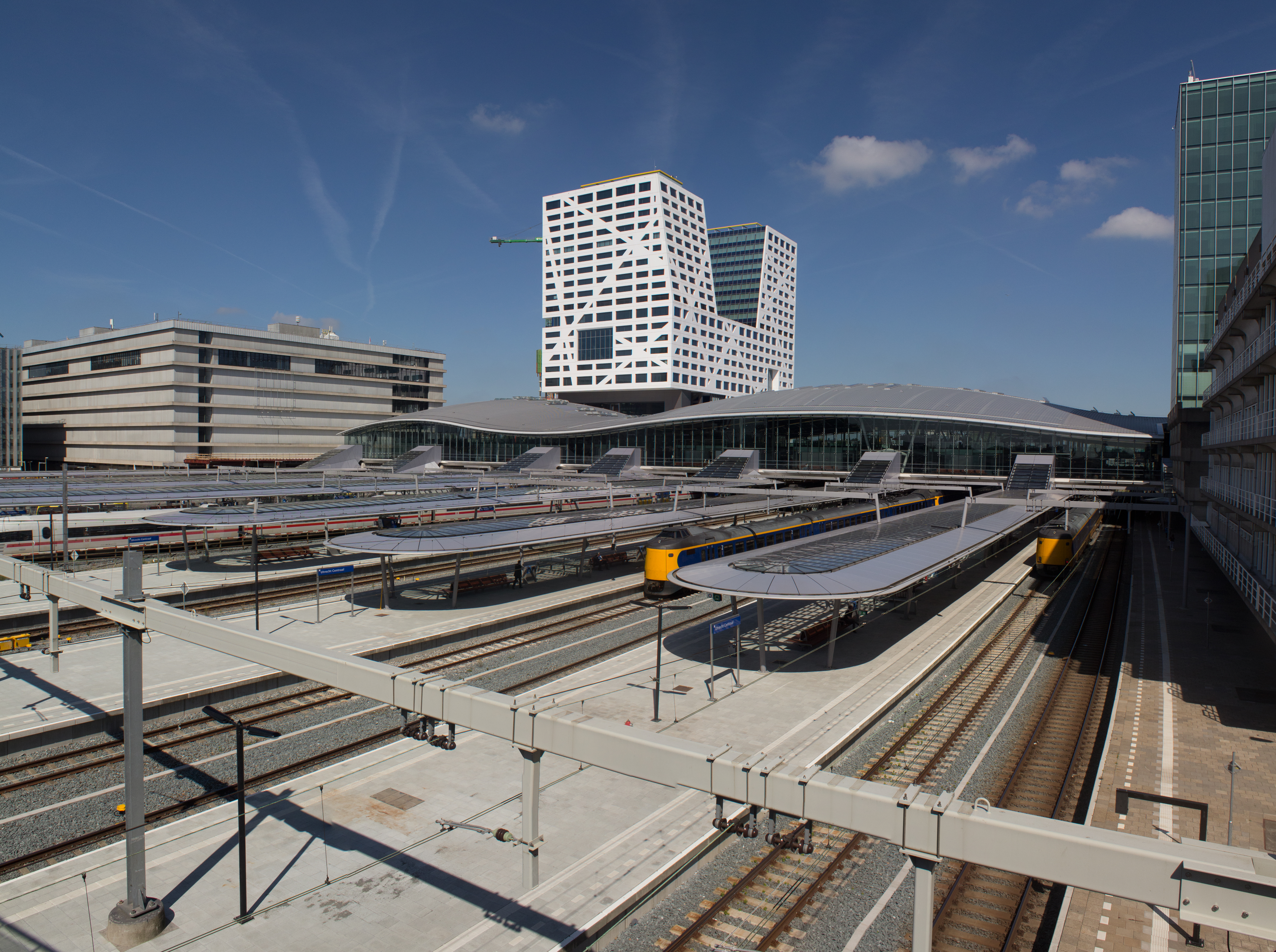 Station Utrecht Centraal vanaf de Moreelsebrug